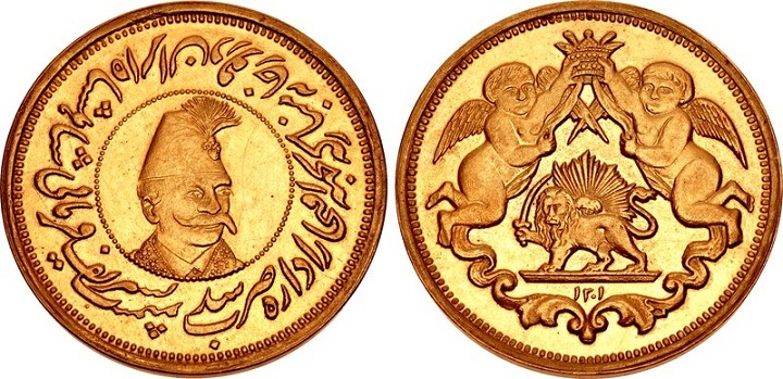 این نشان در سال ۱۳۰۱ ه ق از سه جنس طلا نقره و برنز تهیه گردیده و به رجالی که ناصرالدین شاه را در بازدید از قورخانه همراهی نموده یا در آنجا مشغول بکار بودند متناسب با مقام و منصب اهدا گردید.